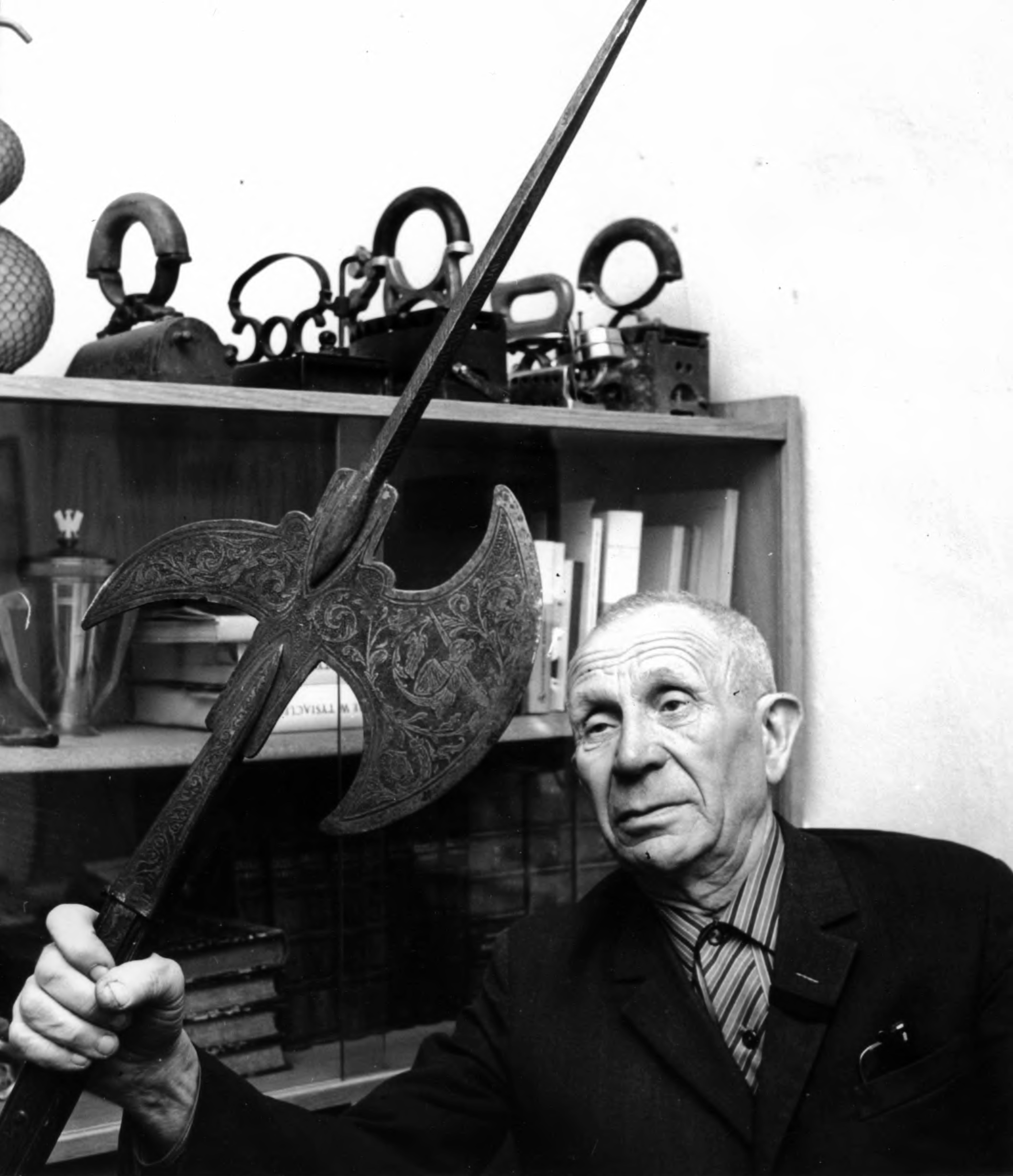 Józef Benbenek - kustosz Muzeum w Przeworsku